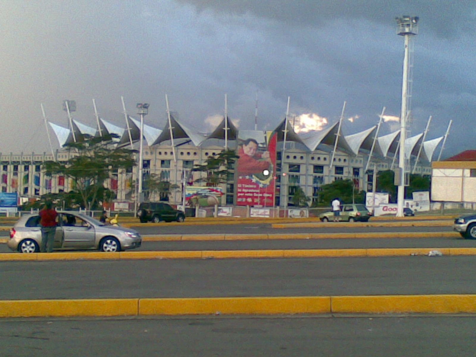 Estadio de béisbol de San Cristóbal, Estado Táchira, Venezuela. Específicamente en Pueblo Nuevo.